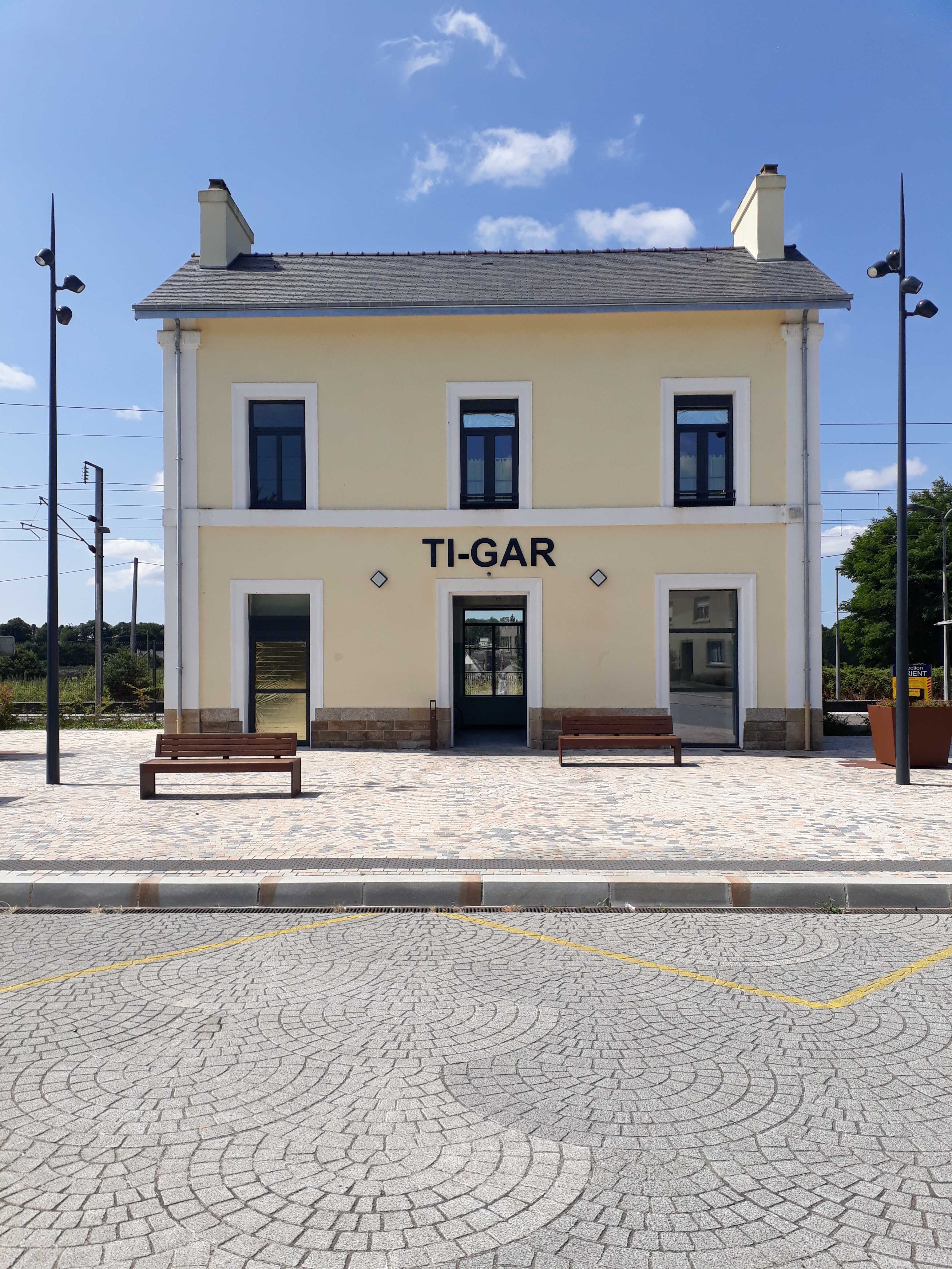 Das ehemalige Bahnhofsgebäude und heutige Wartehalle von Bannalec.